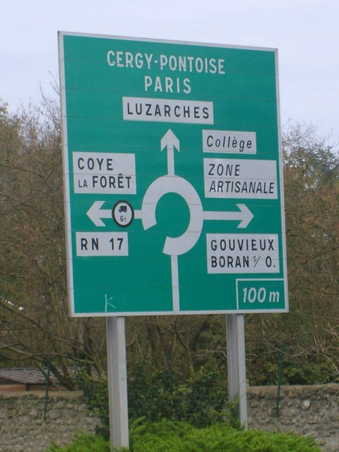 Ancien panneau D42 vert.